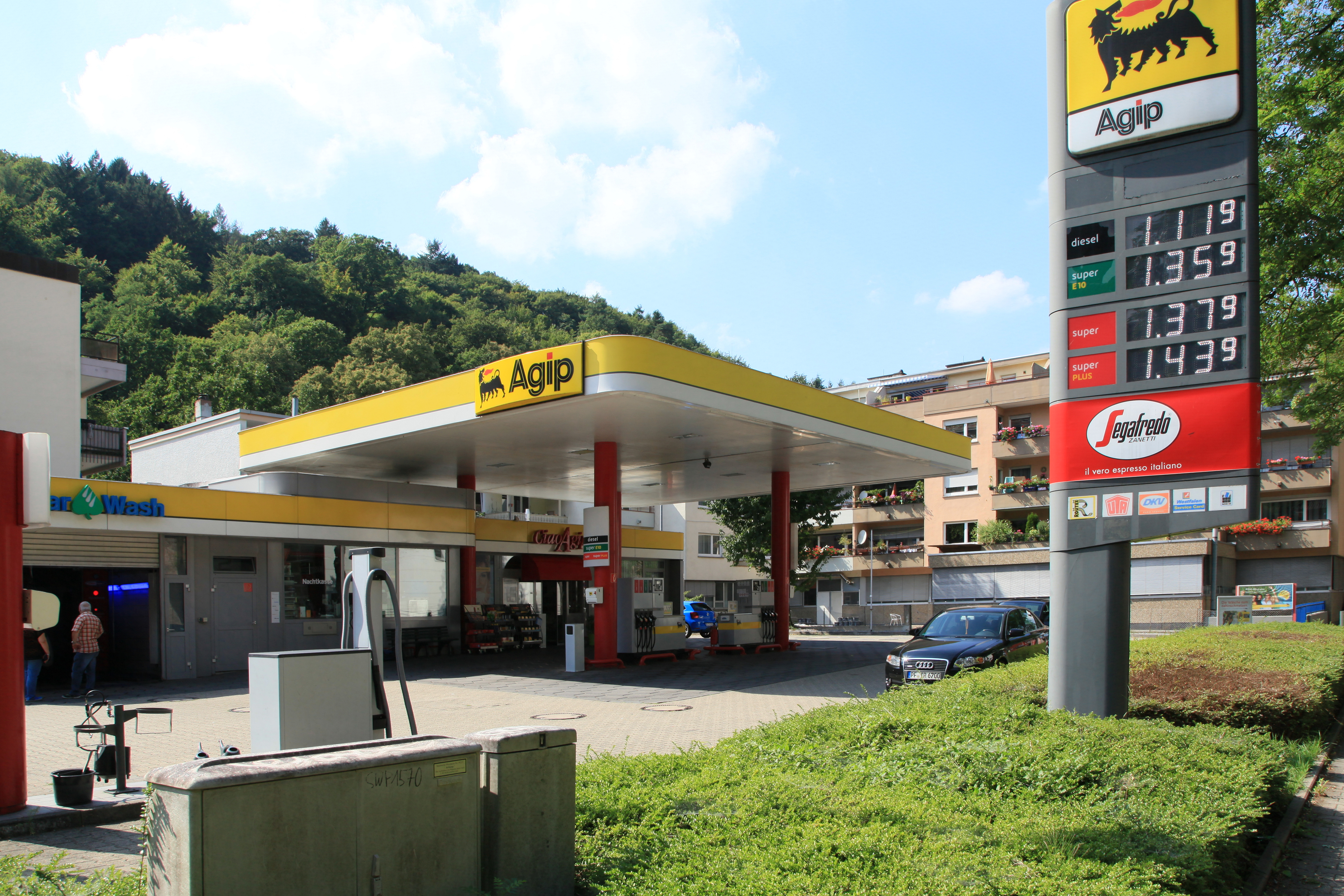 Hirsauer Straße in Pforzheim